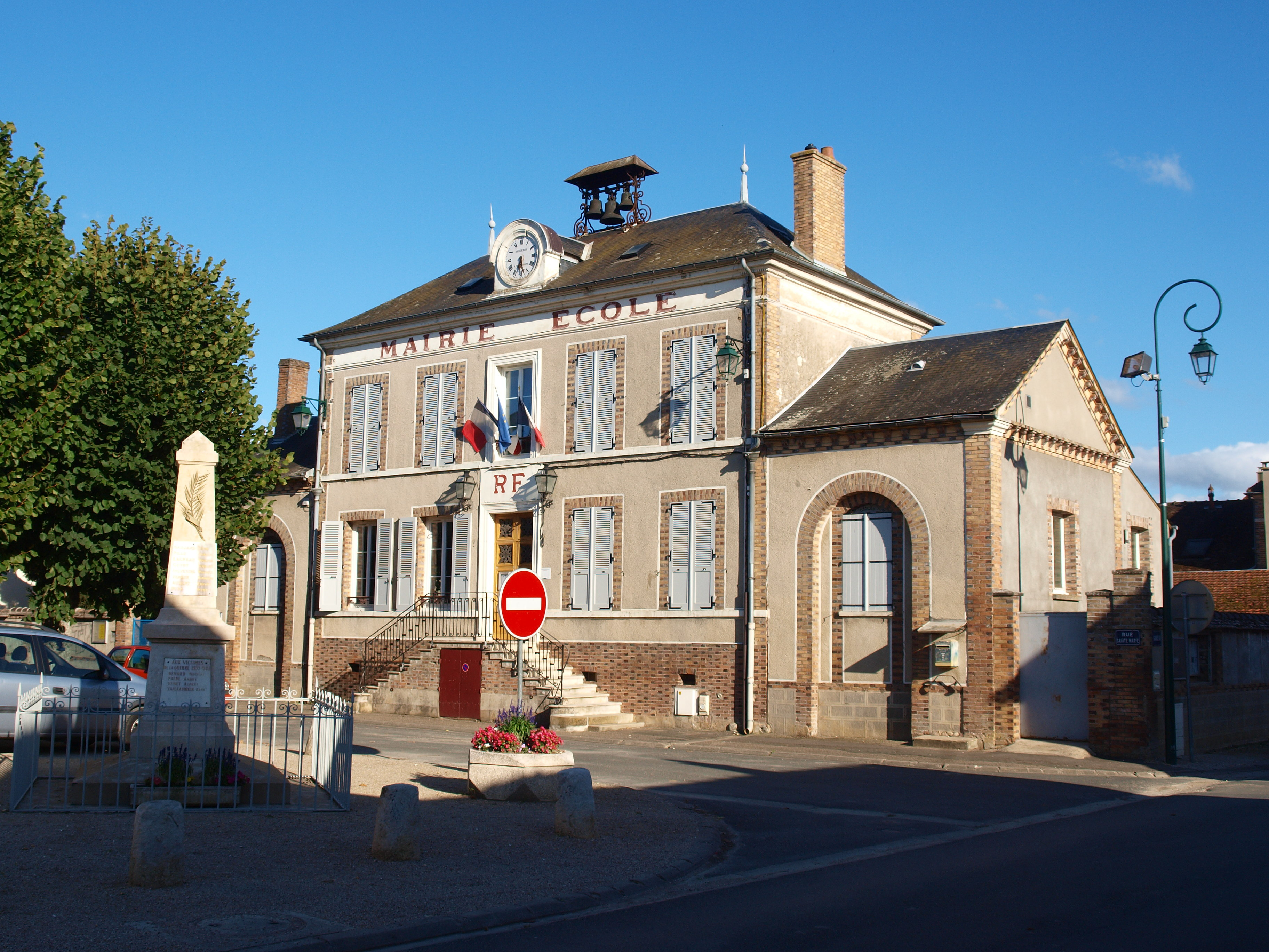 Gisy-les-Nobles (Yonne, France) ; la mairie.